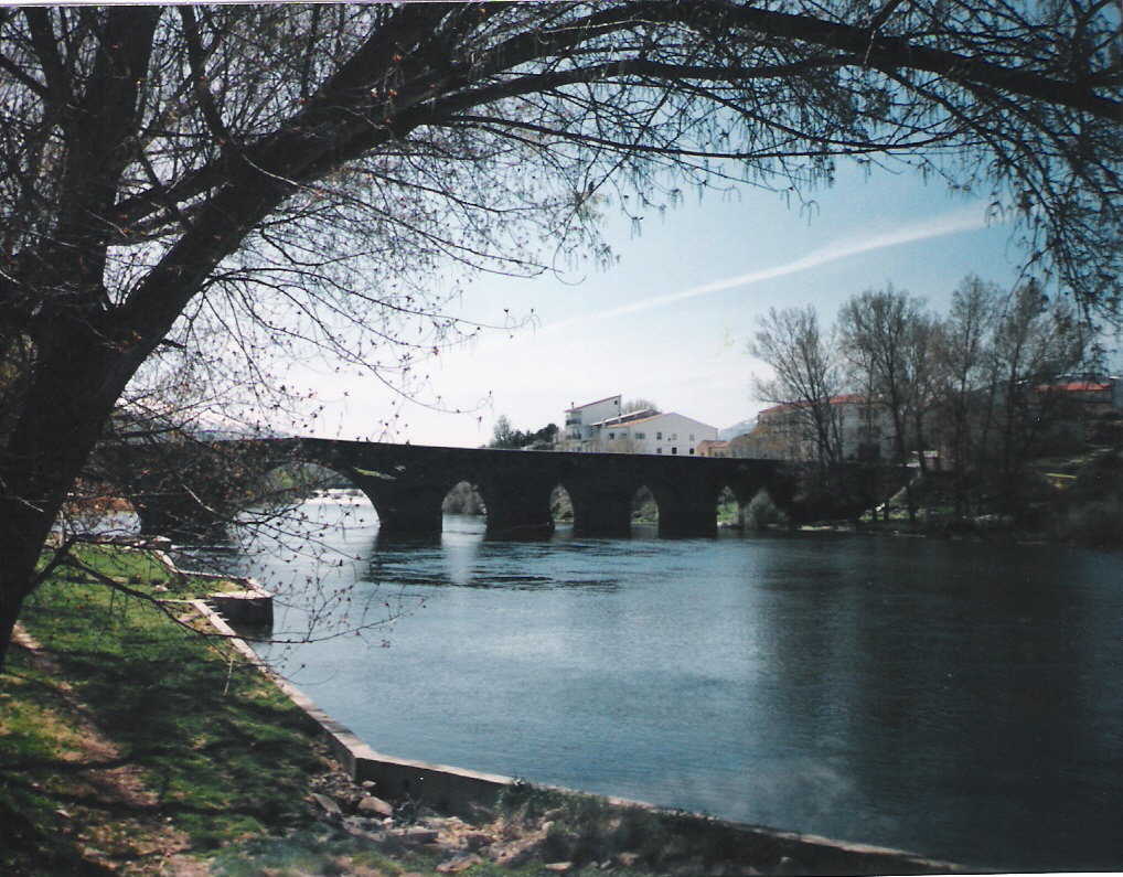 El río Tormes pasando bajo el Puente Viejo en El Barco de Ávila.